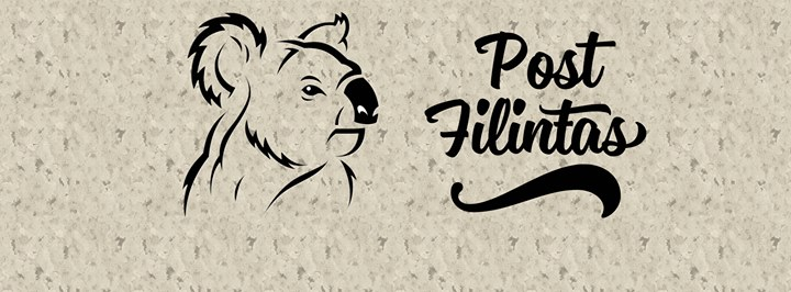 Saytın Loqosu